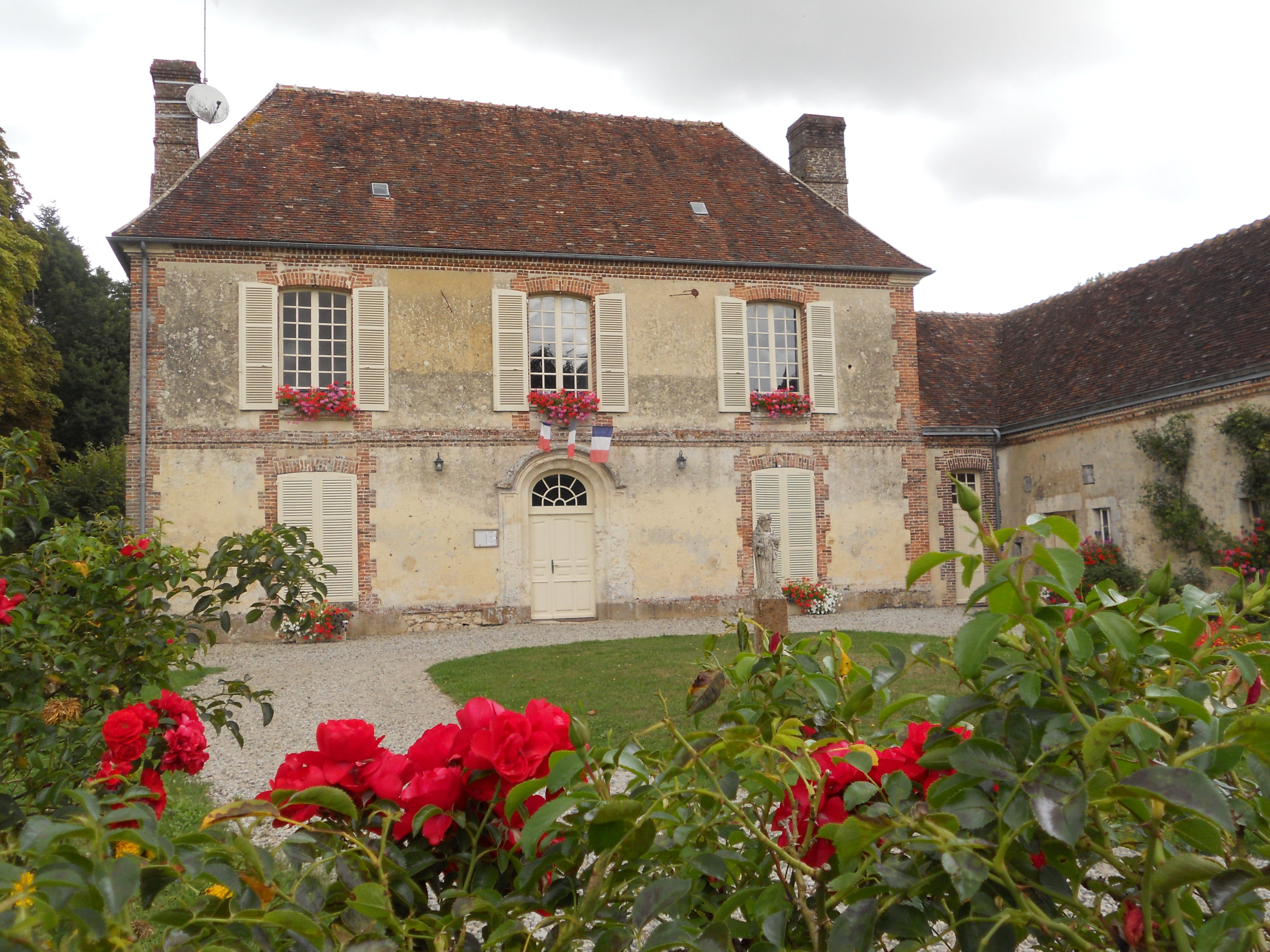 Mairie de Sainte-Céronne-les-Mortagne